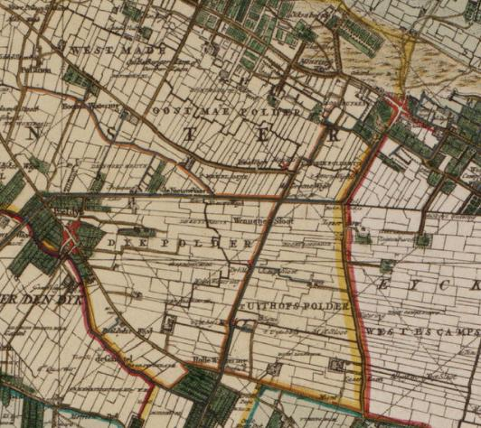 Uithofspolder.